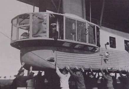 L 24 lander i Tønder med Robert Koch ved vinduet